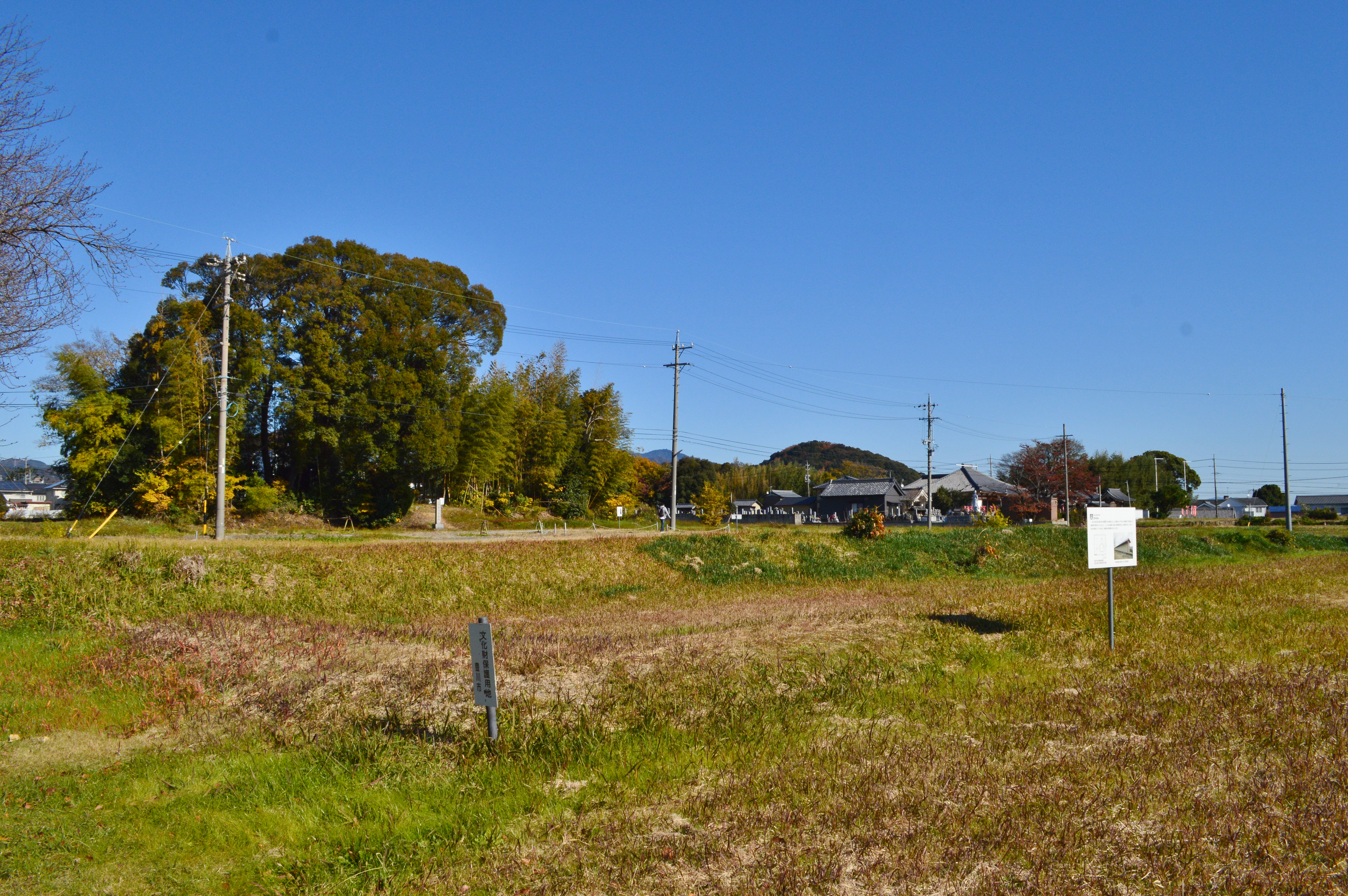 三河国分寺跡 南西隅築地塀跡